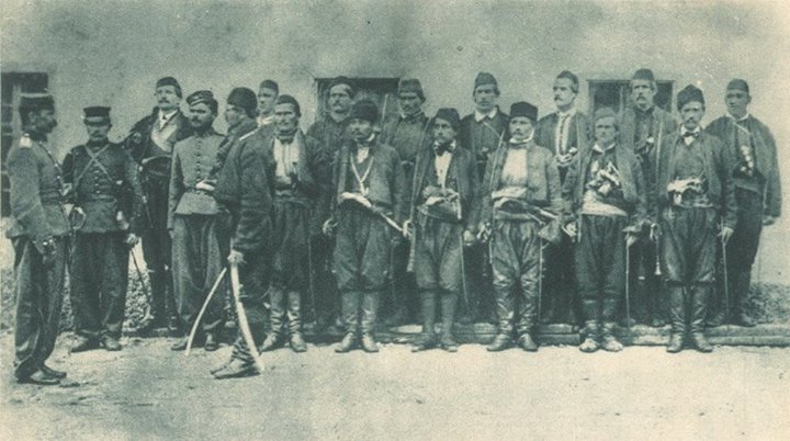 Војници српске коњице са командантом Костом Вучевићем (Бучевићем), 1854. године.